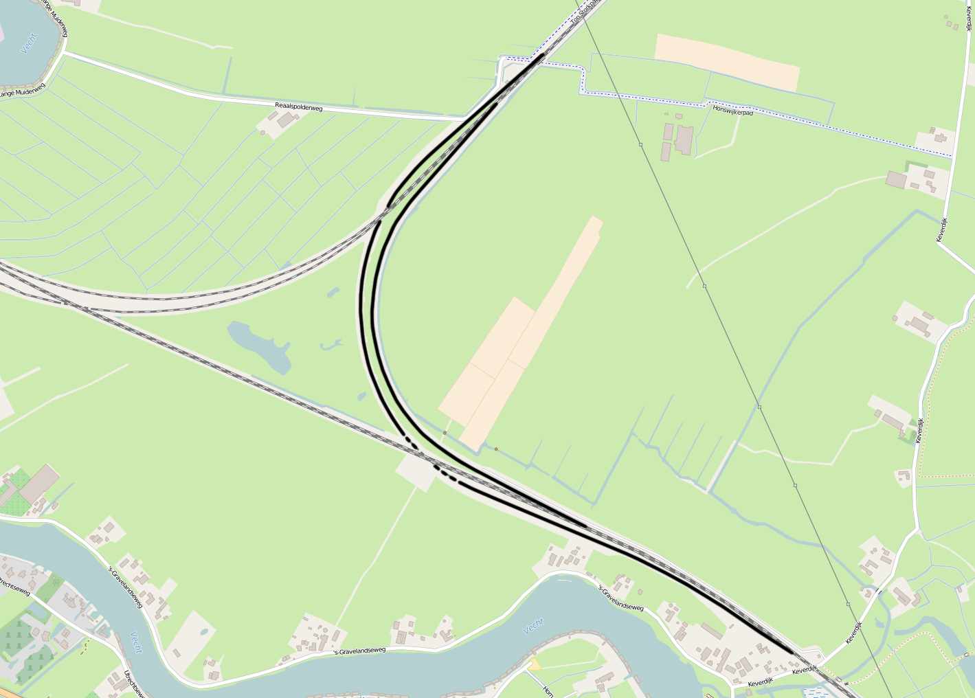 Gooiboog